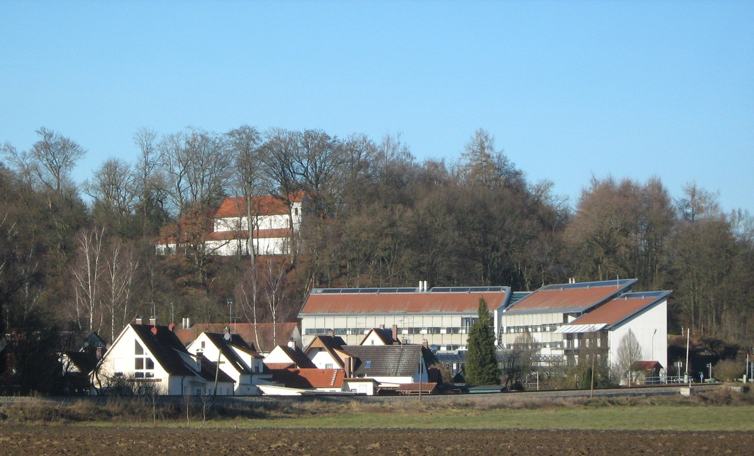 Petersberg in Bayern (von Erdweg aus betrachtet) mit der Basilika St. Peter und Paul und darunter die Landvolkshochschule Petersberg; im Vordergrund die Bahnstrecke Dachau–Altomünster